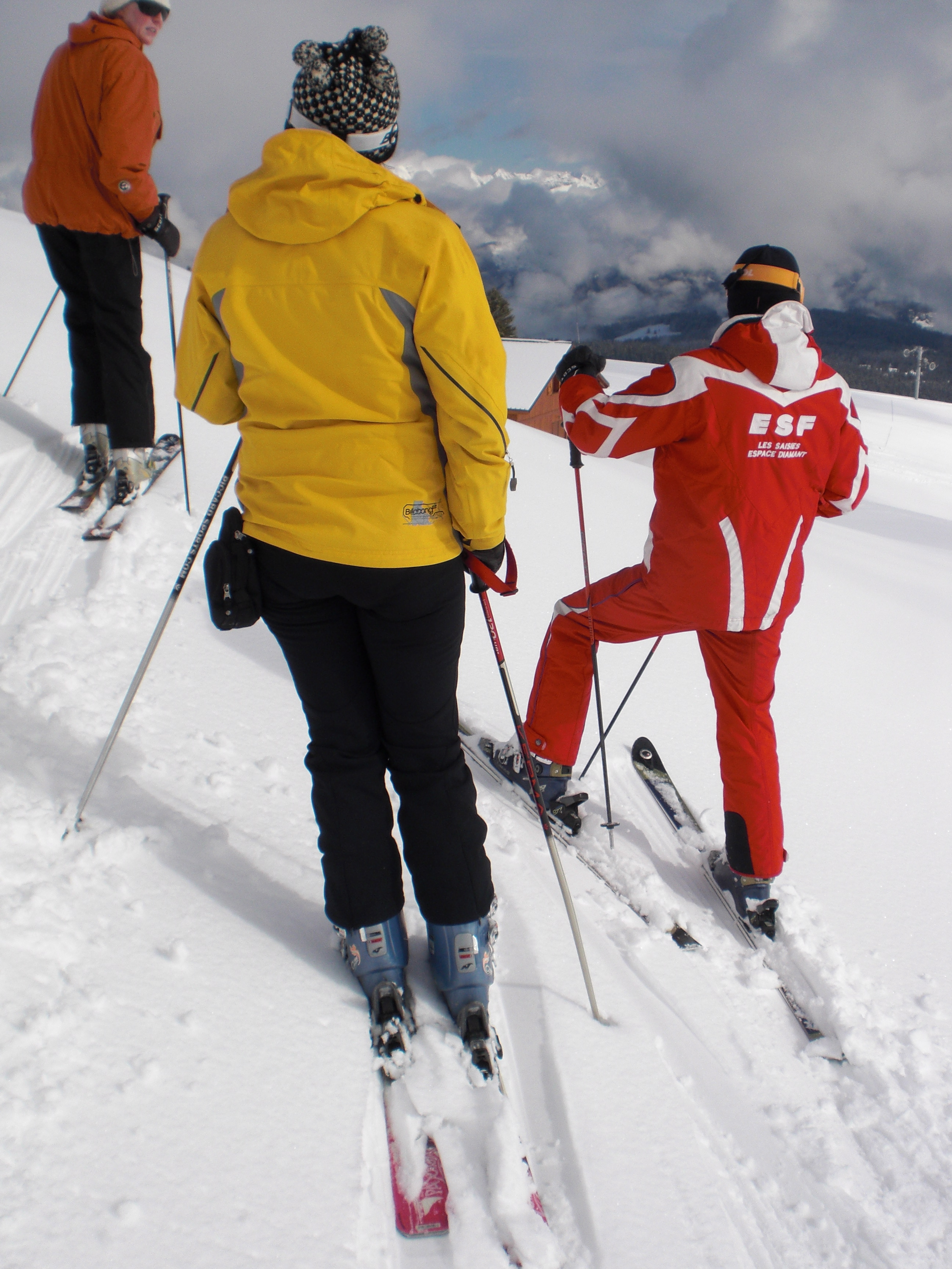 Ski lesson in Les Saisies (French Alps).